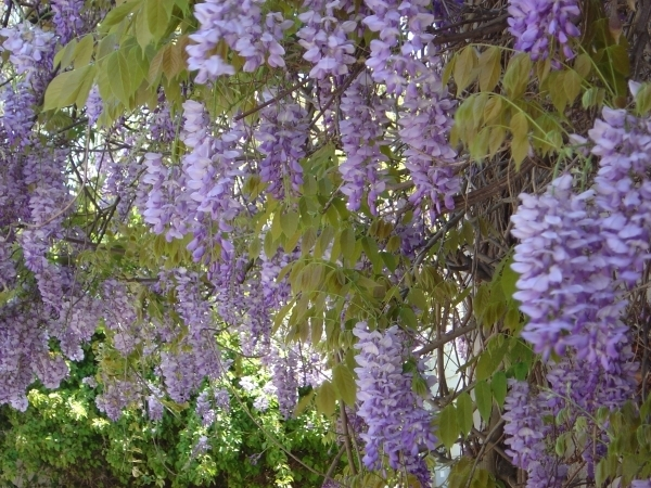 Wisteria (Wisteria sinensis) in bloom.Wisteria